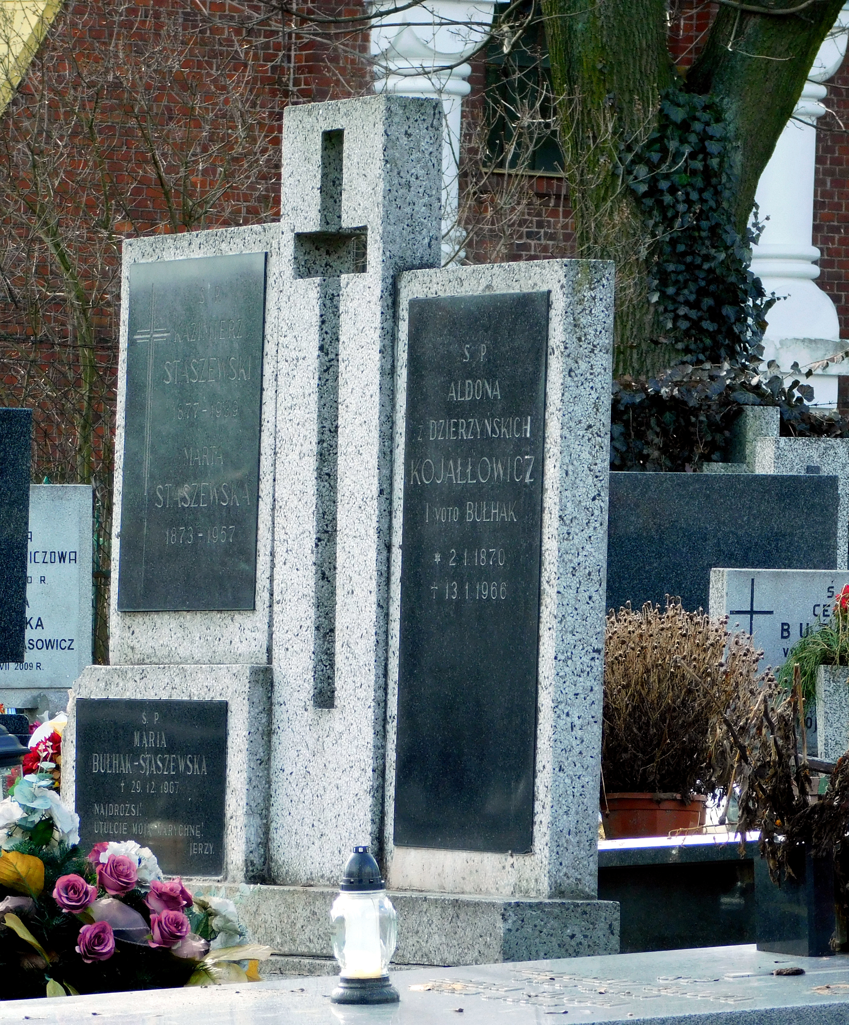 Łódź. Cmentarz św. Wincentego na Dołach. Grób Aldony z Dzierżyńskich Kojałłowicz.